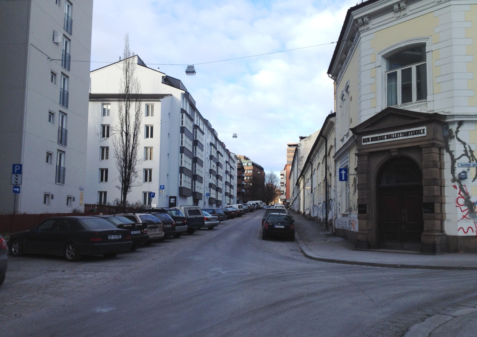 Borggata i Oslo